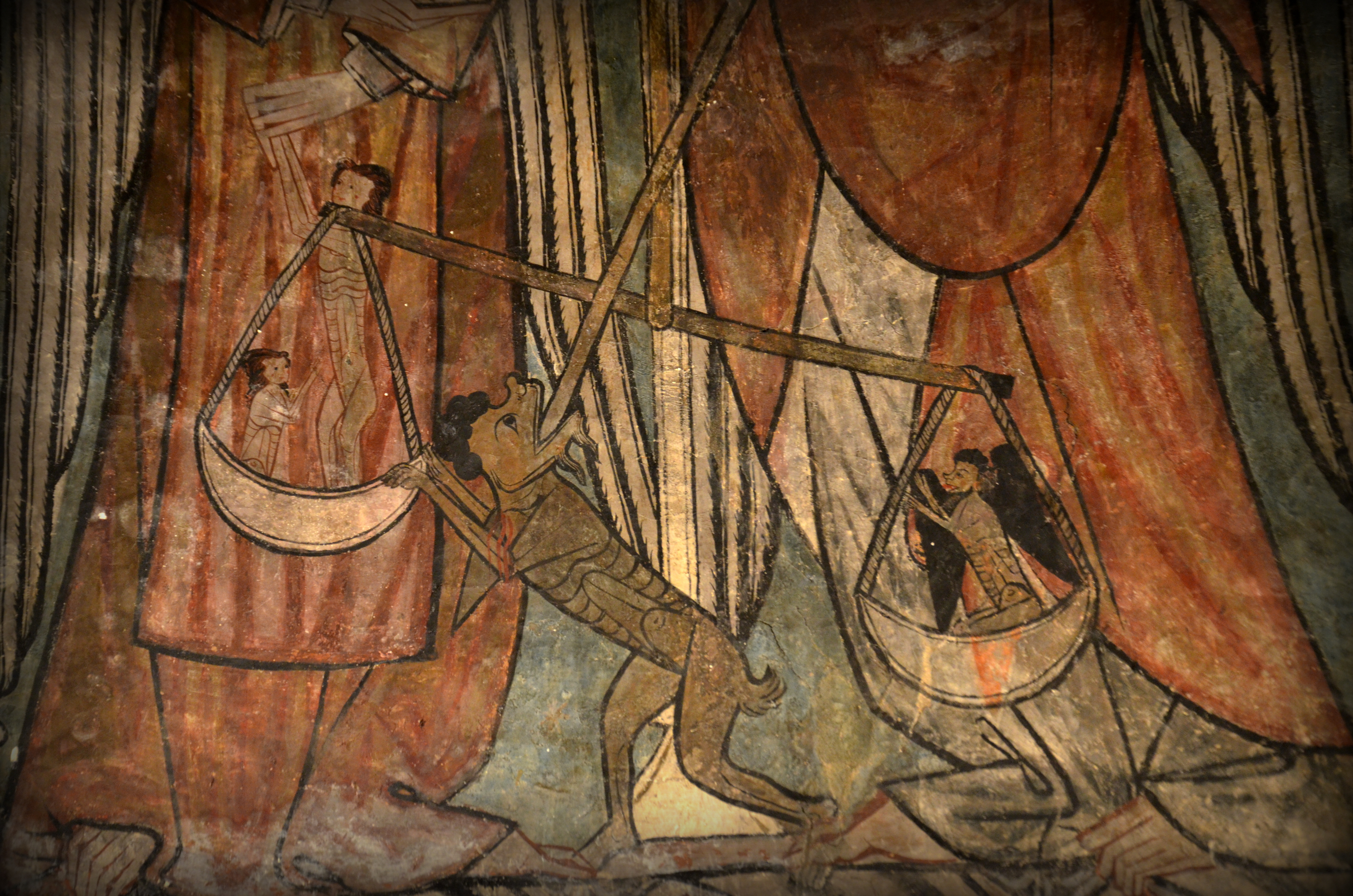 San Martin Tourskoaren eliza erromanikoa (Gazeo, Iruraitz-Gauna, Araba)